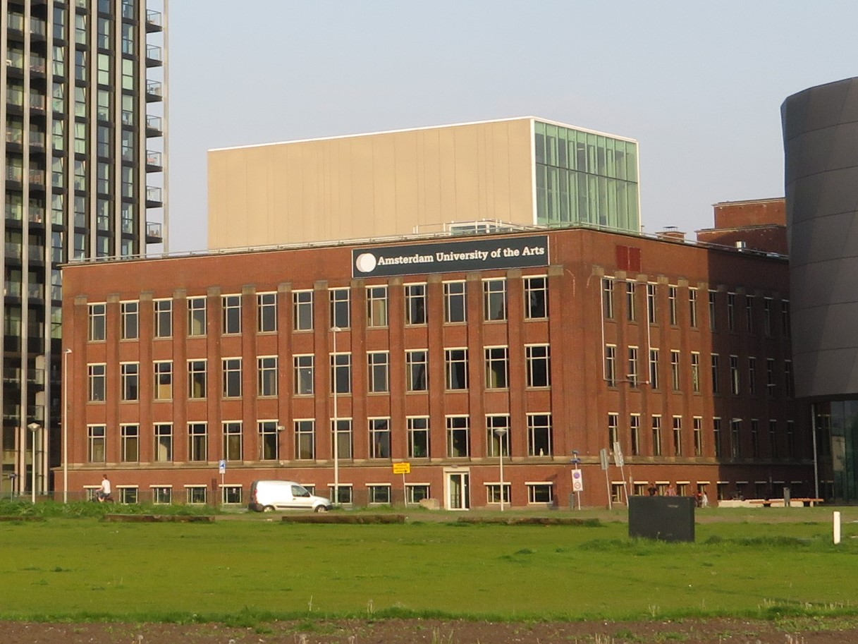 Amsterdam University of the Arts, onderdeel van het Groot Laboratorium, Amsterdam-Noord